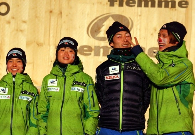 Sara Takanashi, Daiki Ito, Yuki Ito, Taku Takeuchi podczas dekoracji medalistów konkursu drużyn mieszanych na skoczni normalnej (Mistrzostwa Świata 2013, Val di Fiemme).